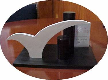 calidad del tec